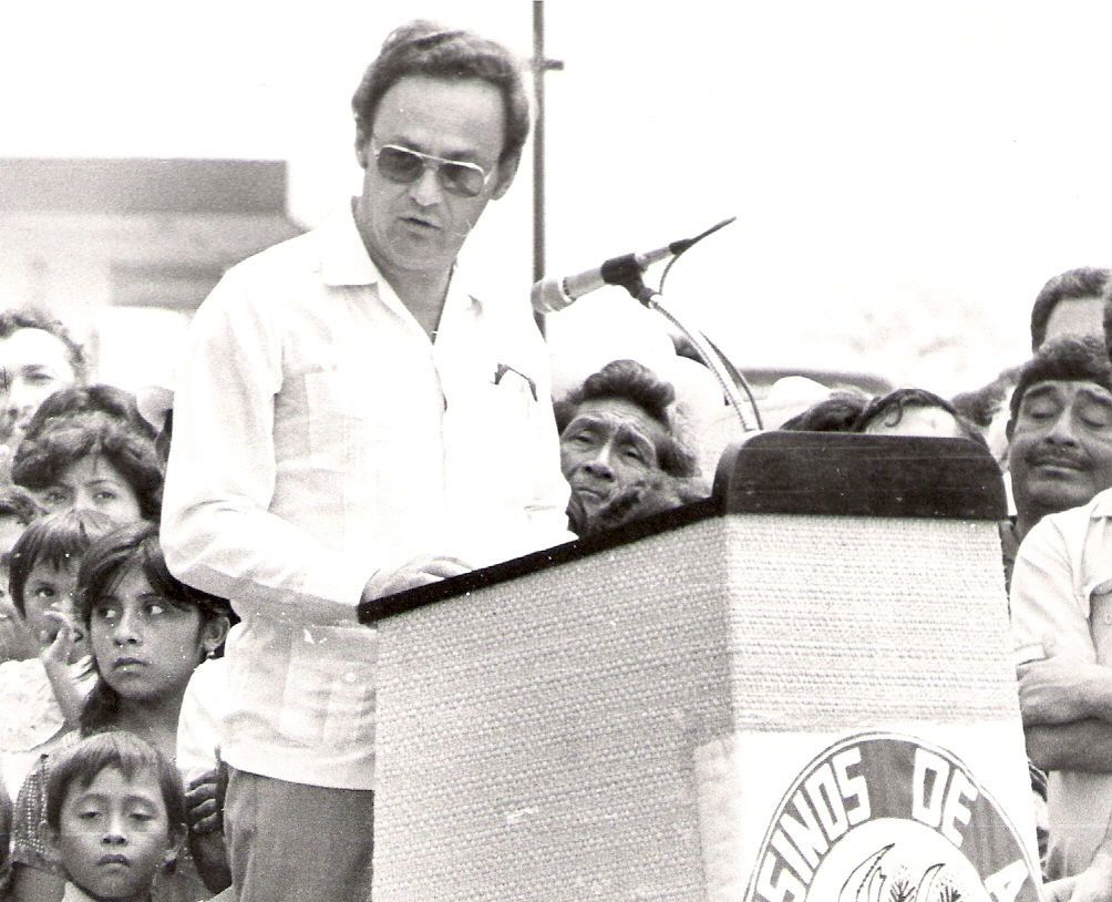 Fotografía del Diputado Menendez tomada en Yucatán en ocasión a la puesta en marcha del Programa de reordenación henequenera en presencia del Presidente Miguel de la Madrid. Yucatán México